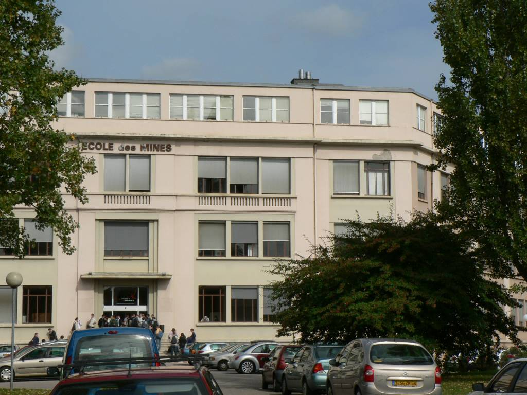 Photo de face de l’École des mines de Nancy.